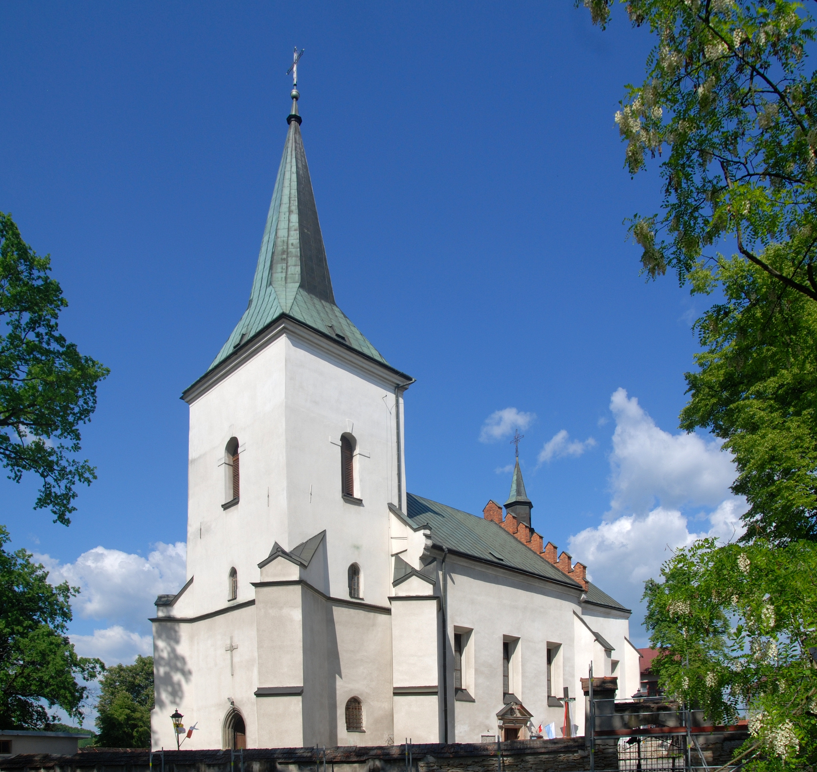 miasto Bobowa